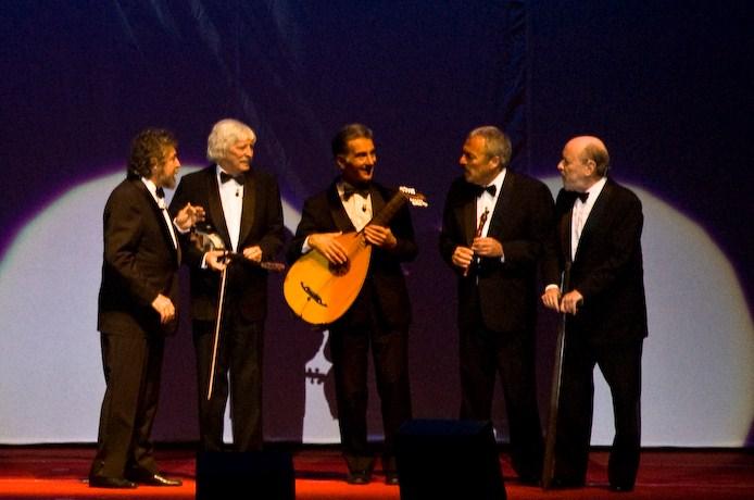 Les Luthiers durante una interpretación del recital "Los Premios Matropiero"